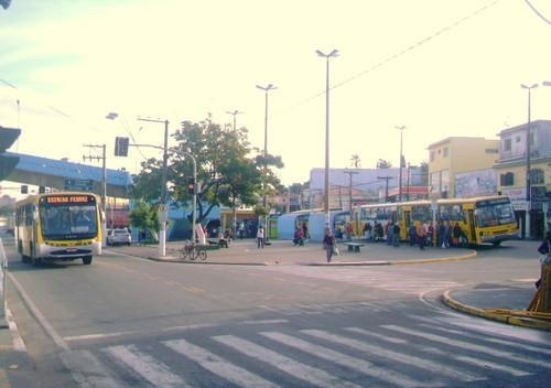 Ferraz de Vasconcelos